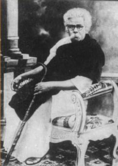 Indian freedomfighter Periyar E. V. Ramasamy